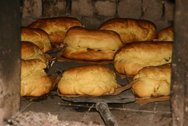 Folar de Chaves (Portugal), no forno especialidade gastronómica Portuguesa.